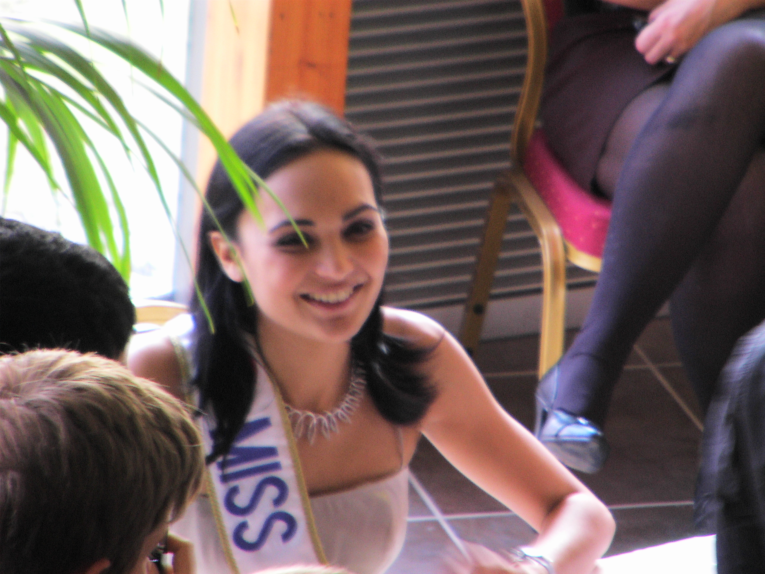 Valérie Bègue, née le 26 septembre 1985 à Saint-Pierre, a été élue Miss France 2008, avec l'écharpe de Miss Réunion le samedi 8 décembre 2007 au terme d'une soirée diffusée sur TF1 en direct de Dunkerque. Prise de vue le 13 janvier 2010 à l'hippodrome de Pau.